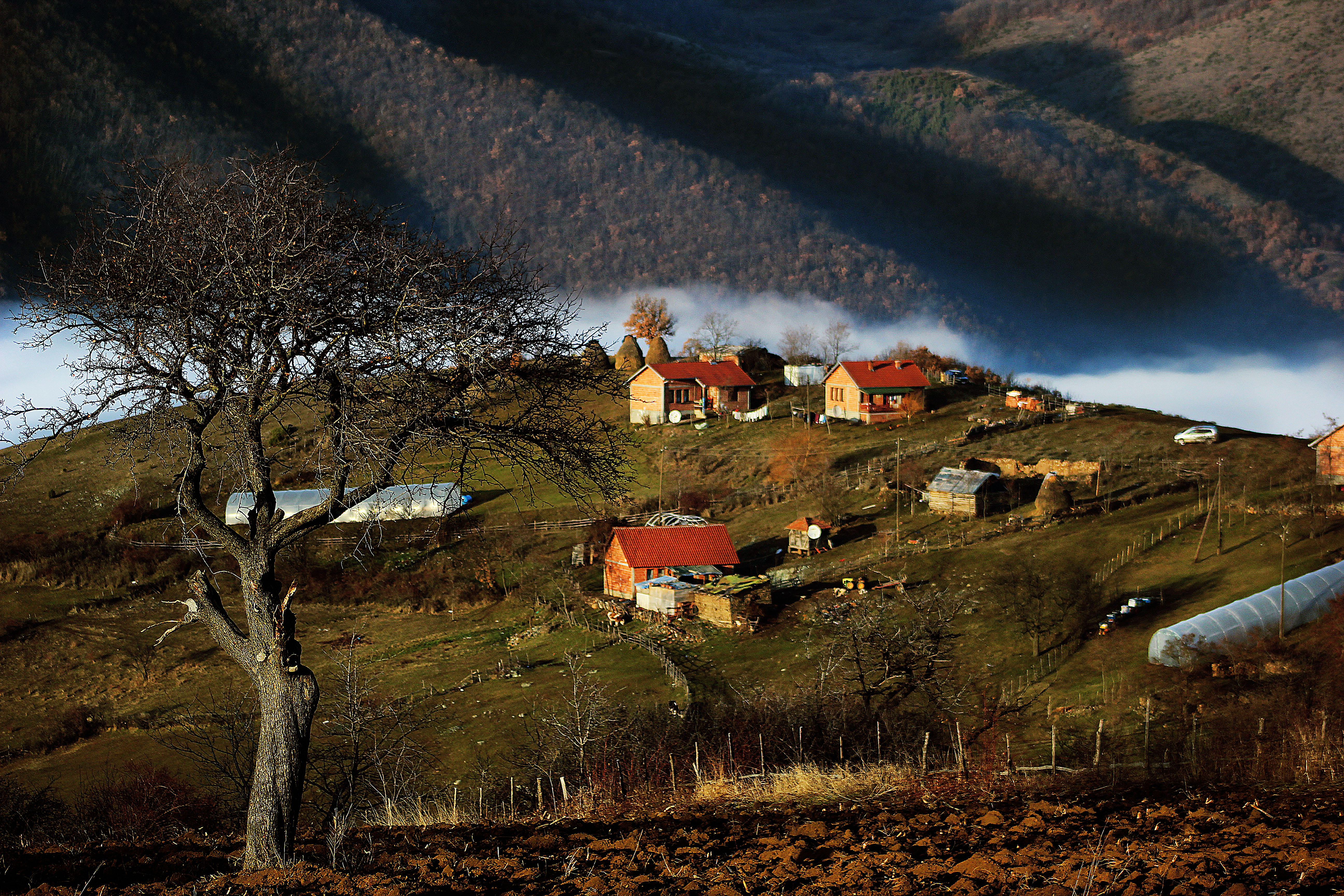 Fshati Cerajë në veri të Mitrovicës gjatë një dite dimri me mjegull, fshat ky me peisazh të bukur